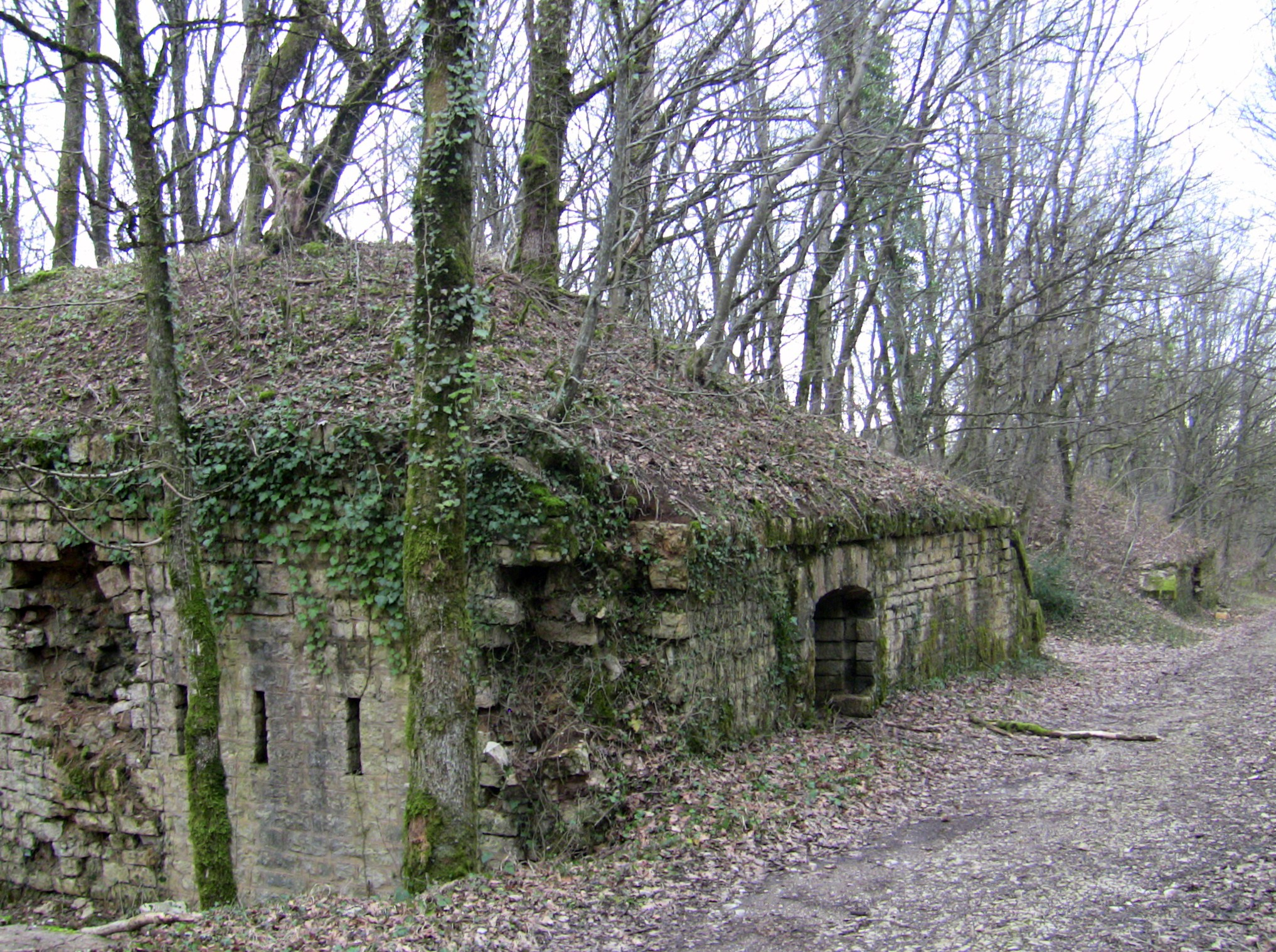 Vue générale des batteries annexes sud-ouest du fort de Planoise, à Besançon (Doubs, France)